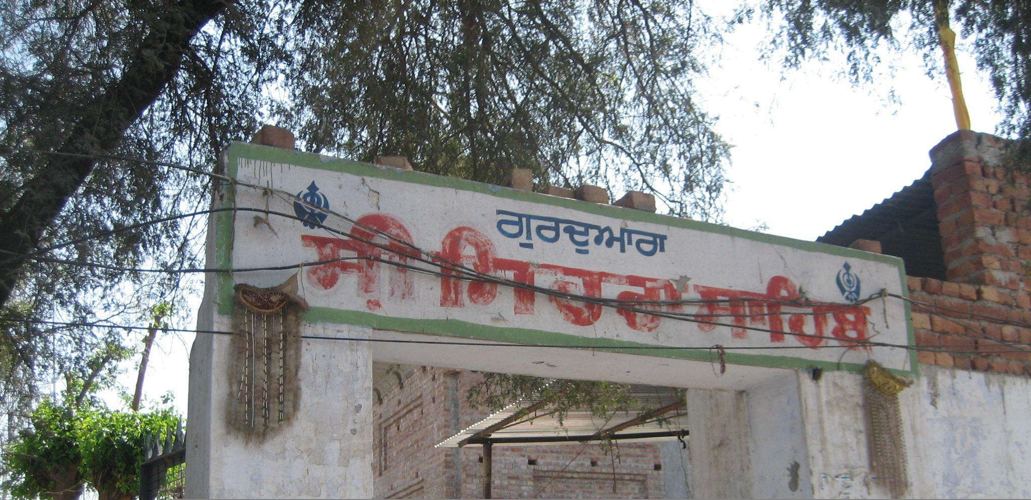 Gurudwara Shree Sehra Sahib